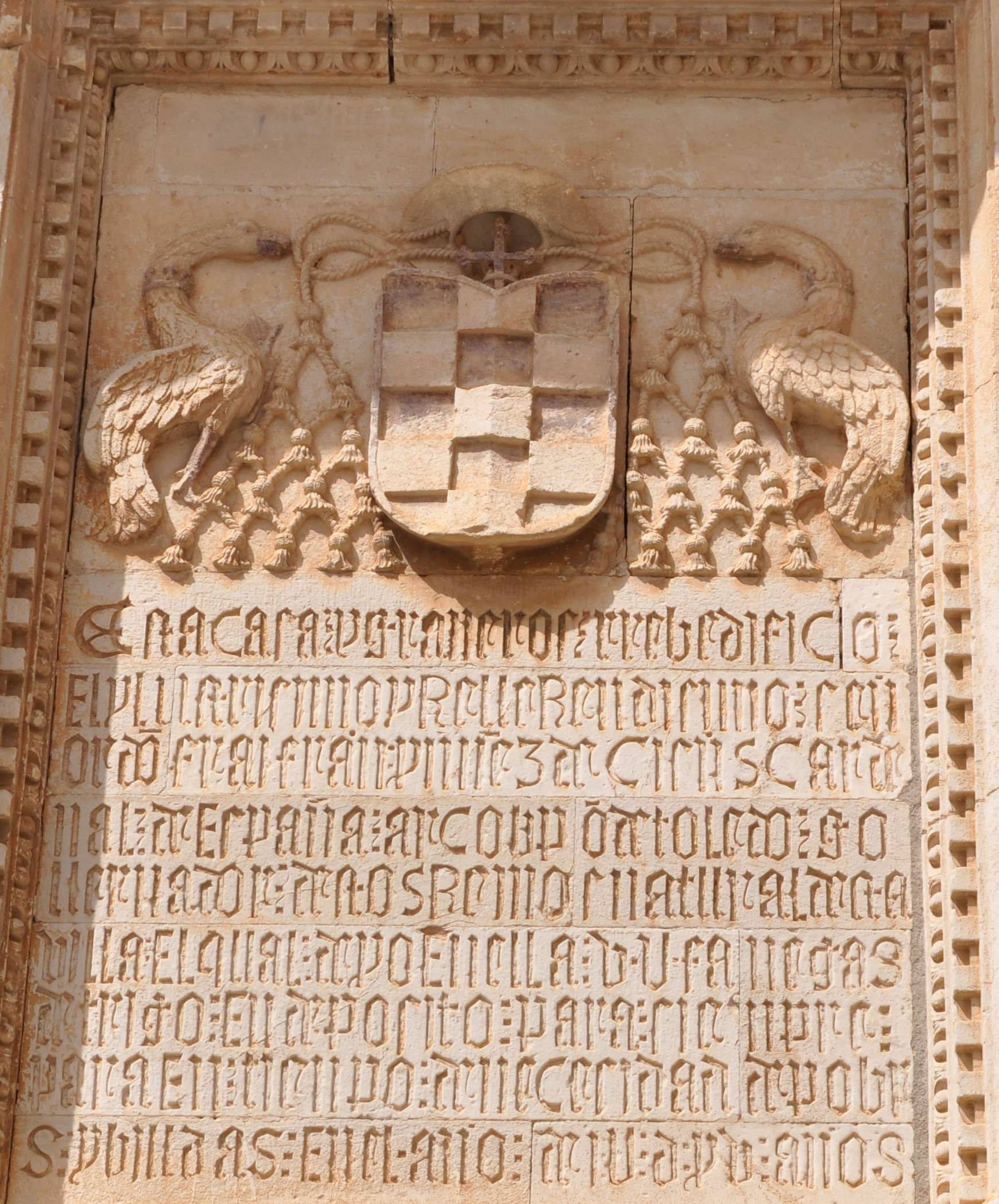 Escudo Cisneros - Ayuntamiento de Torrelaguna, en Madrid (España)